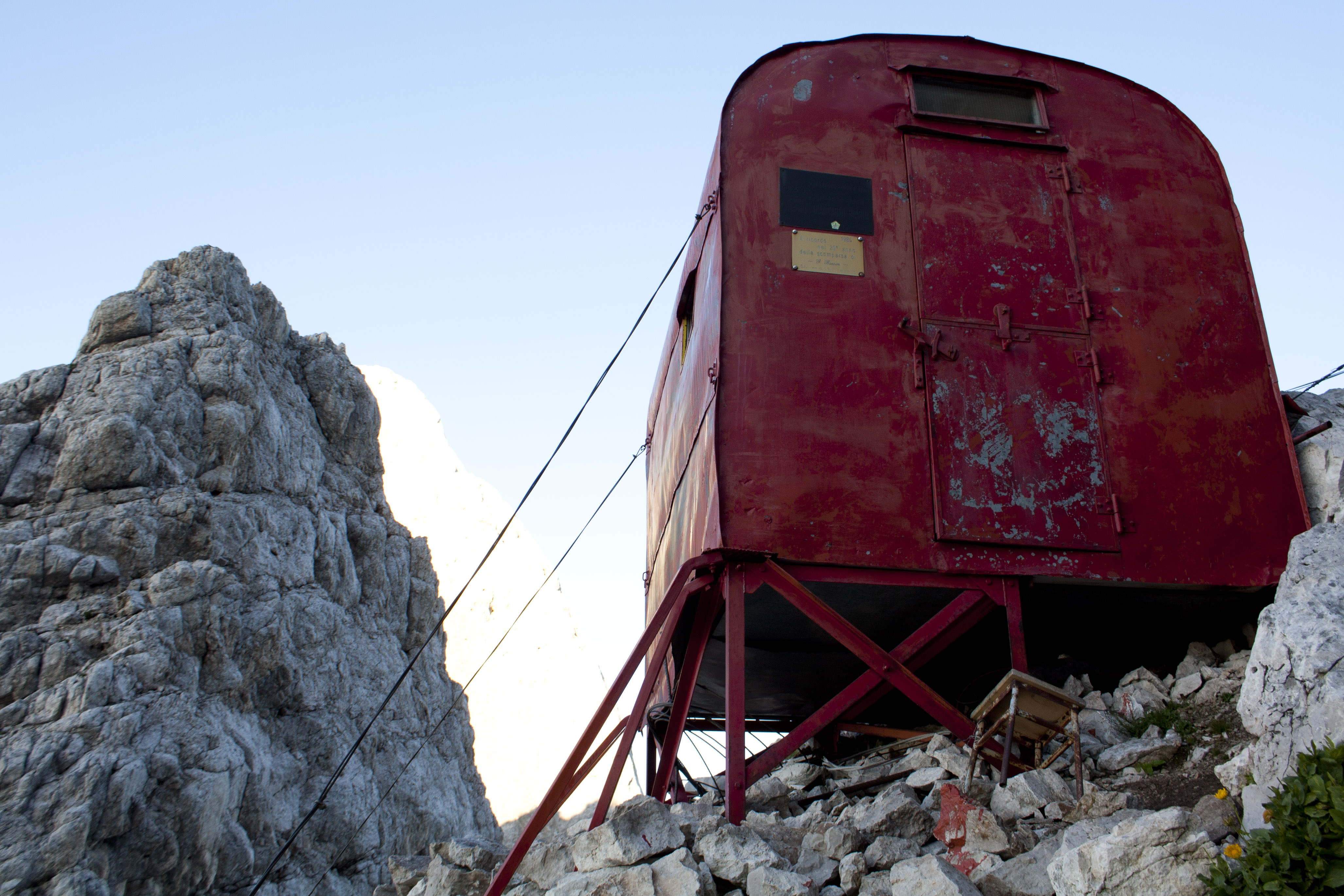 Pale di San Martino: Focobon, Pape - San Lucano, Agner - Croda Granda (Q49963040)